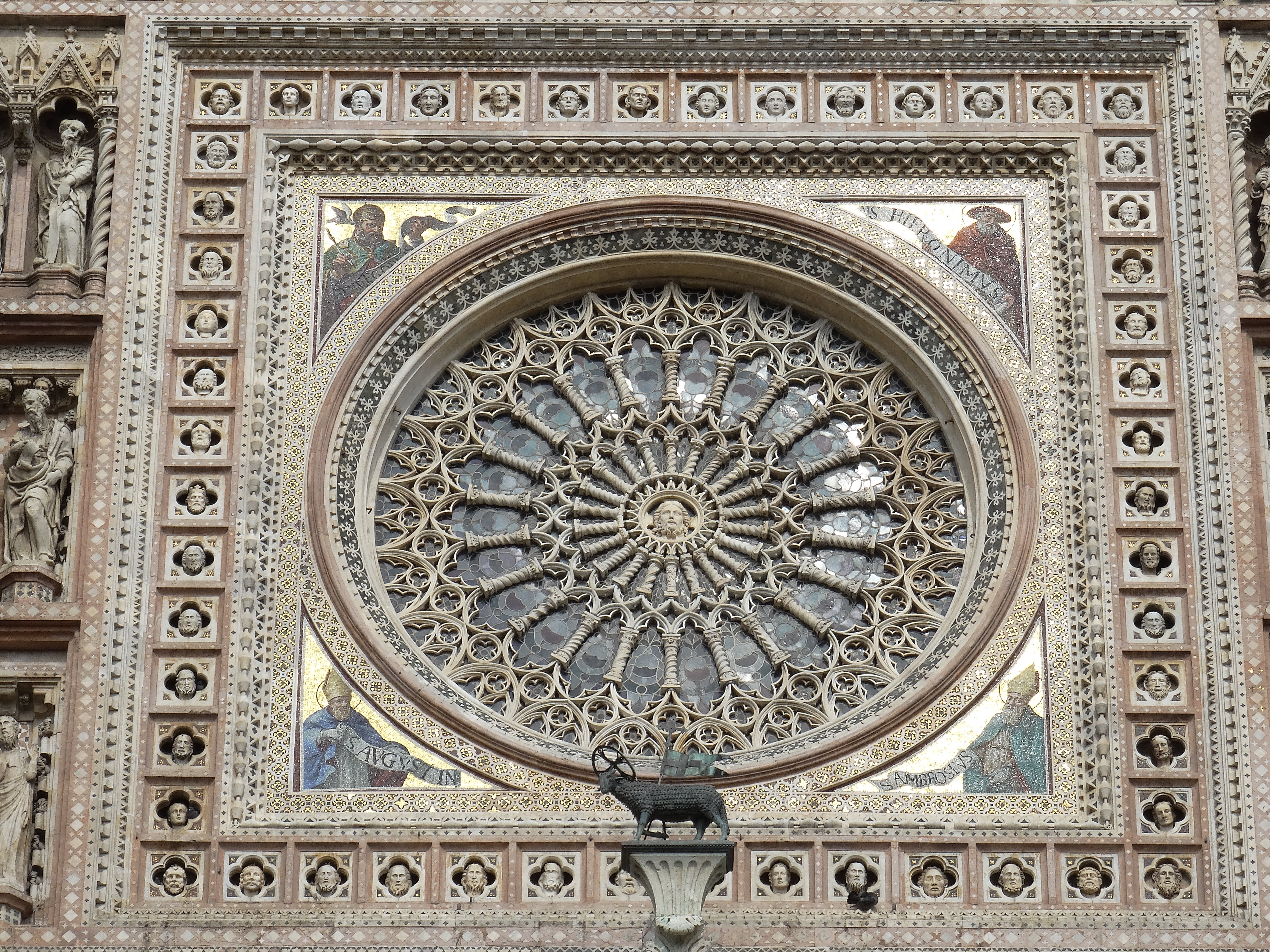 Orvieto